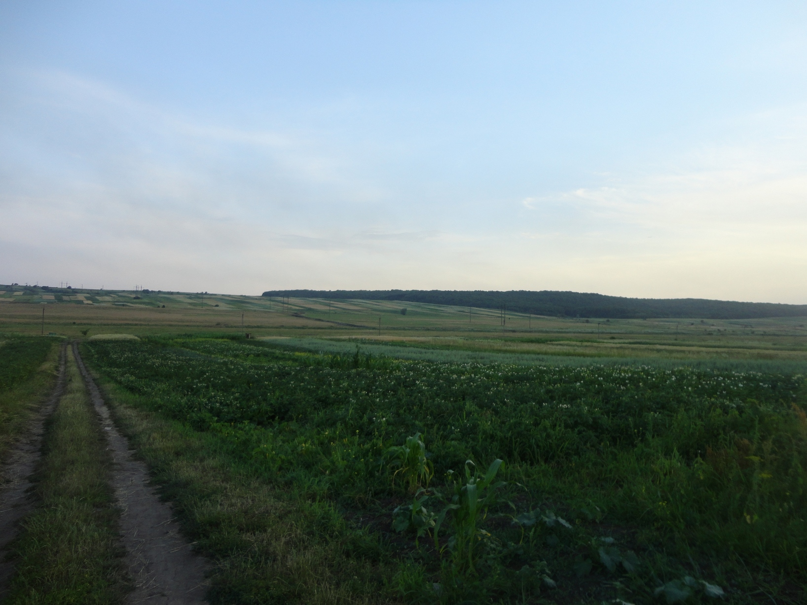 Фото лип 2012 Вид на північні околиці Бурштина